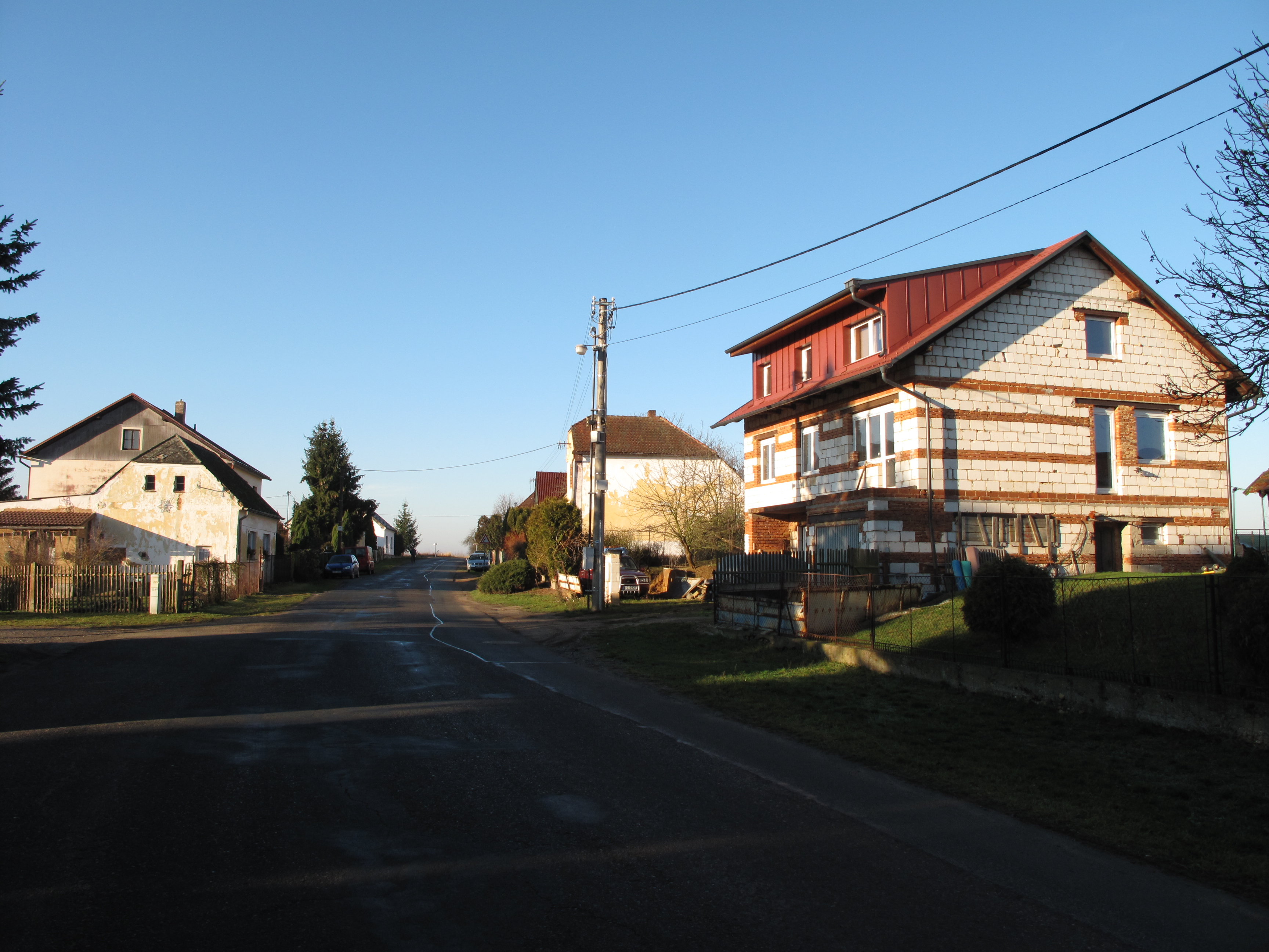 Domy v Losině. Okres Plzeň-jih, Česká republika.